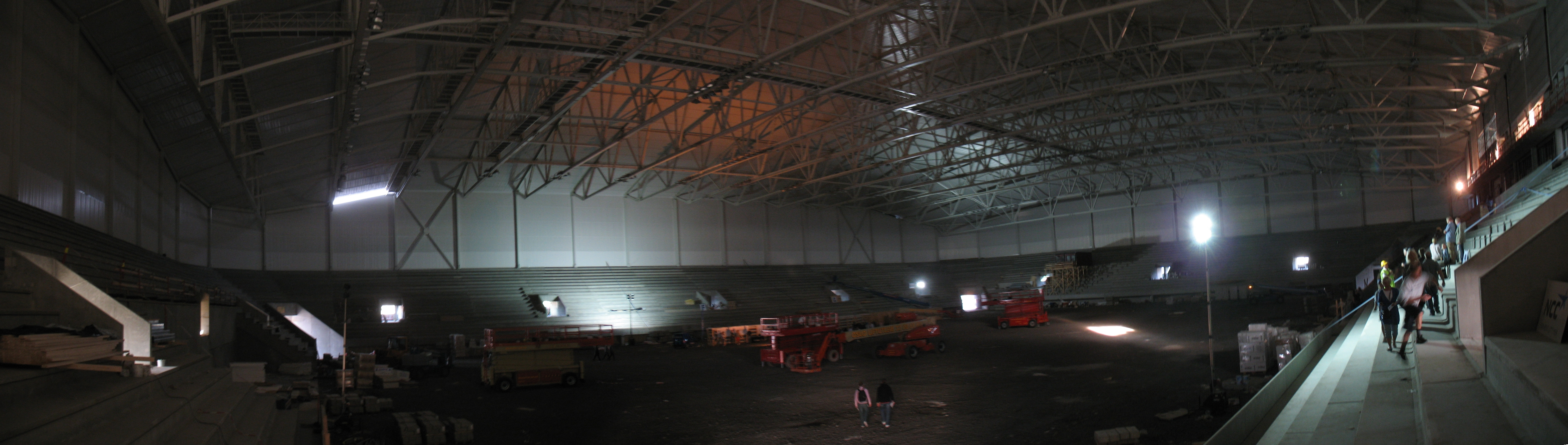 Telenor Arena på Fornebu under bygging.